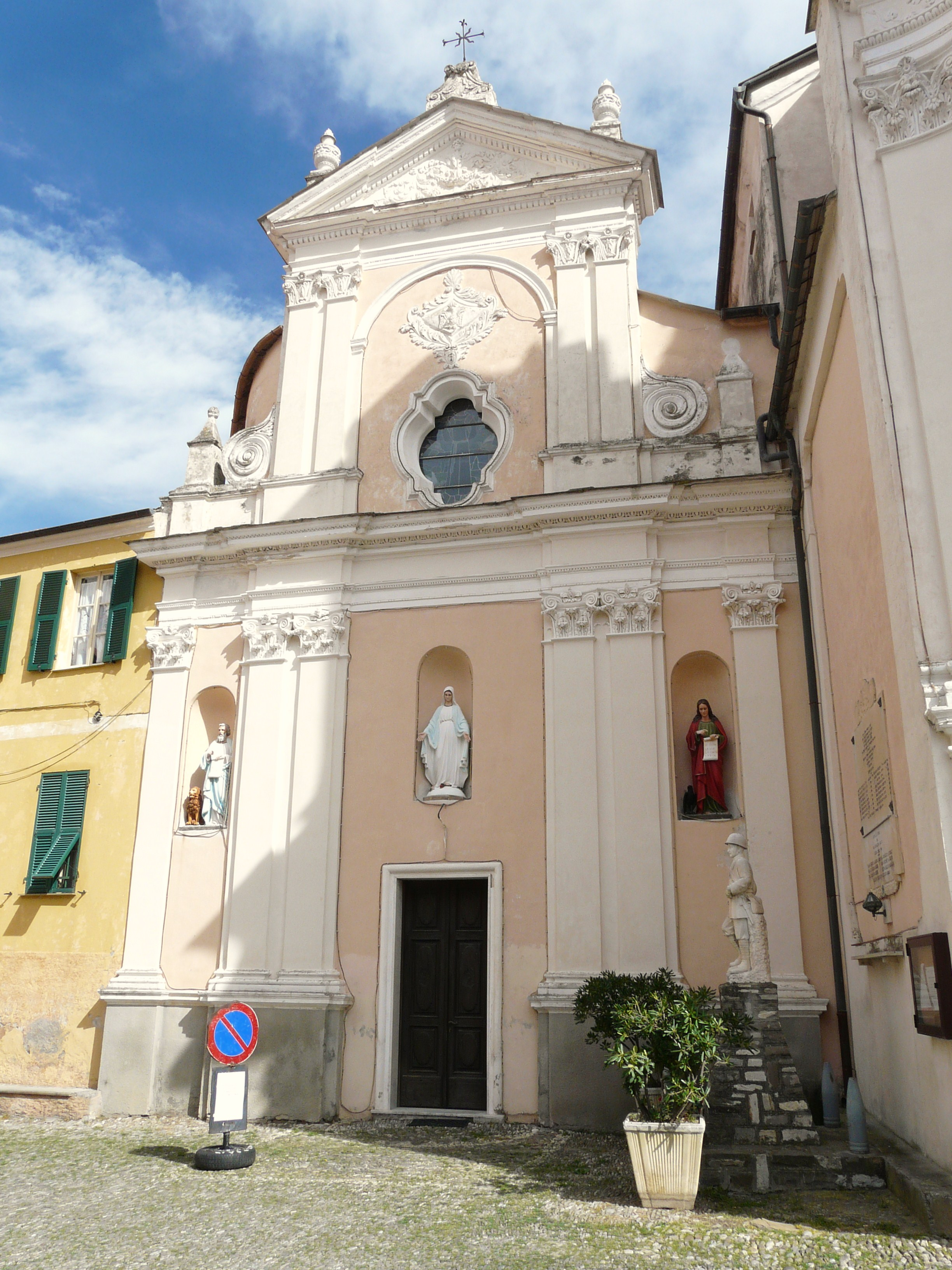 Oratorio di San Giovanni Battista, Civezza, Liguria, Italia